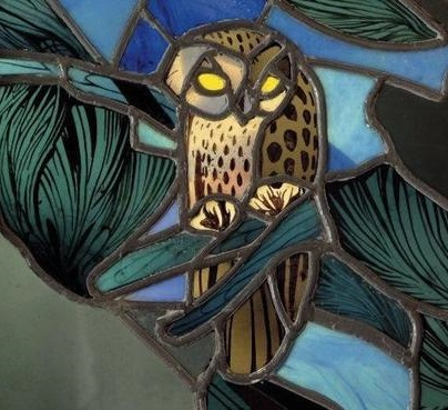 Gufo rappresentato in una vetrata della Casina delle Civette a Roma